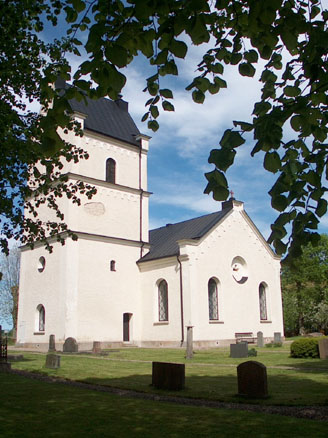 Källstad kyrka